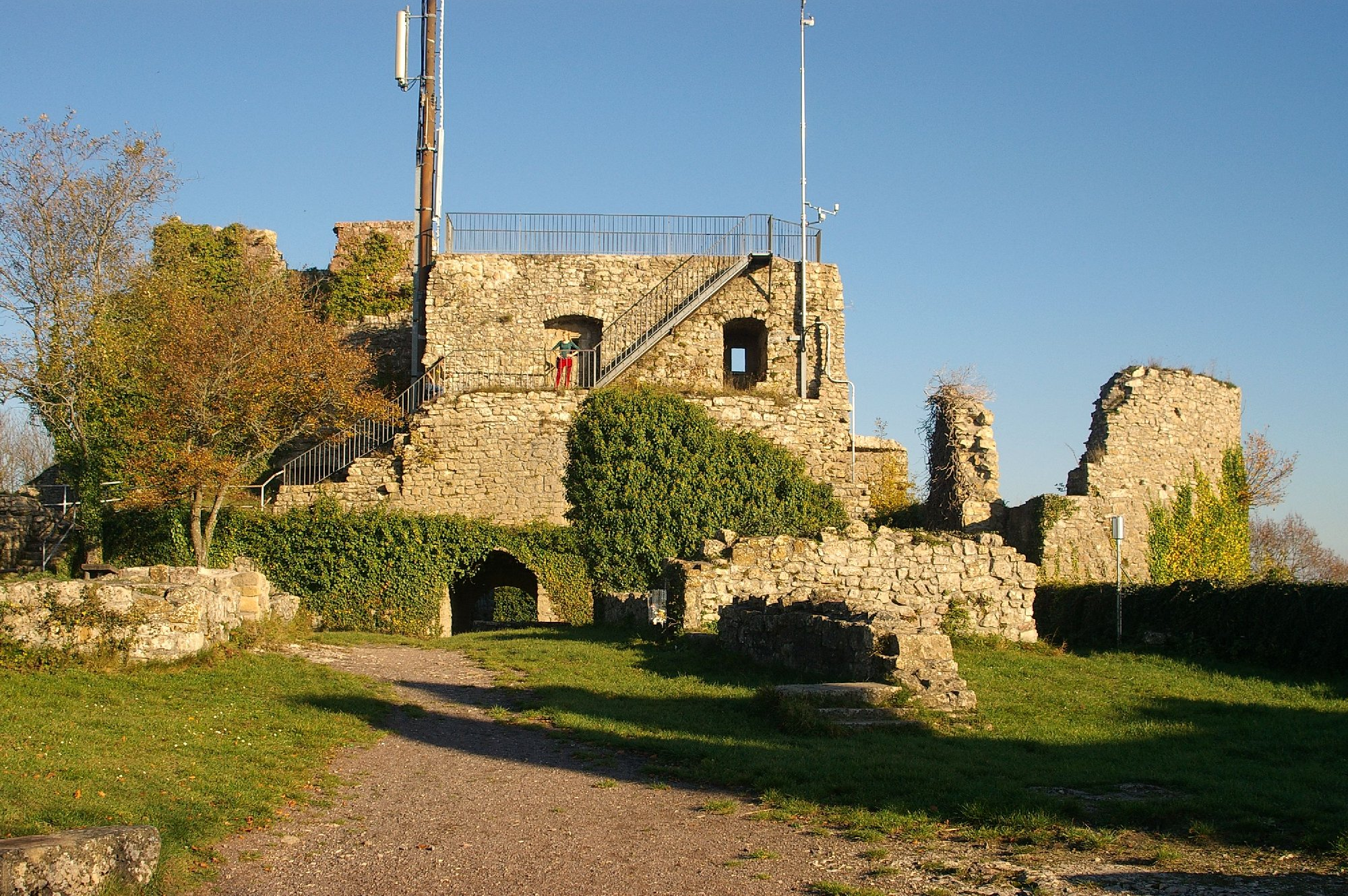 Küssaburg Blick innen